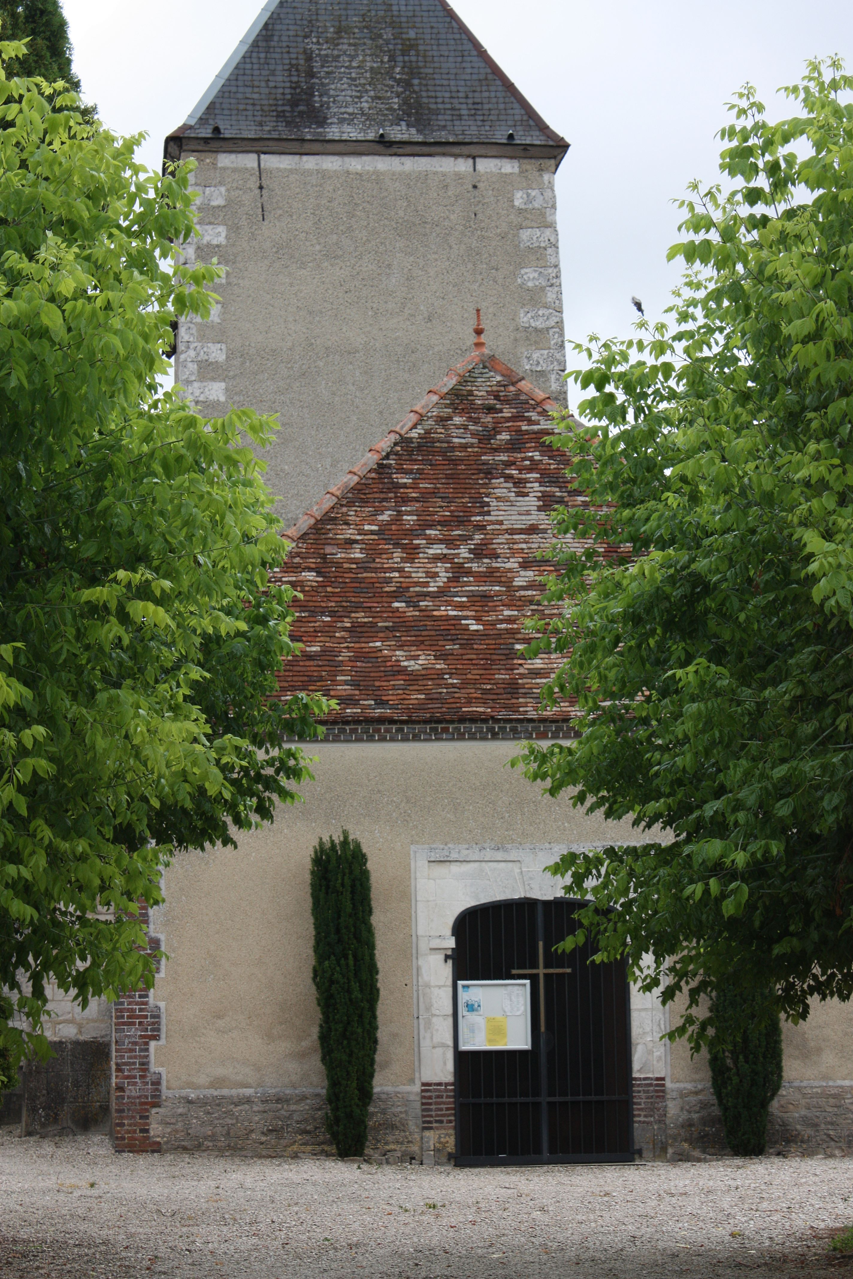 Saint-Mesmin - Eglise Saint-Pierre-aux-Liens Façade Ouest